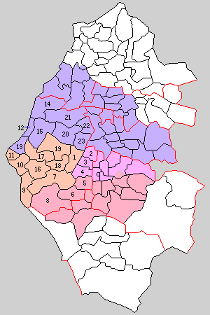 福井県丹生郡の町村制時点の町村。